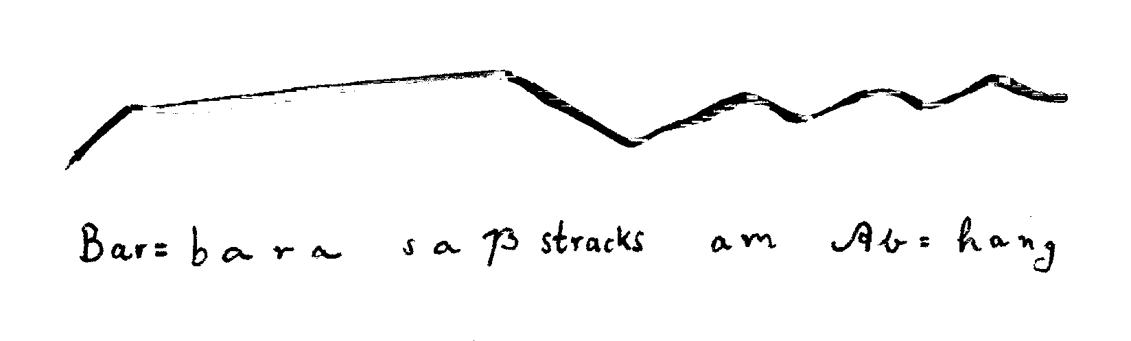 Zeichnung nach Rudolf Steiner: Fluss, Hebungen und Senkungen der Sprache